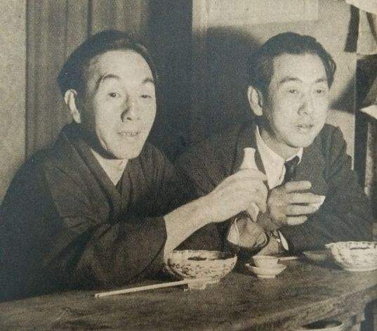 岩田専太郎（左）と成瀬巳喜男（右）